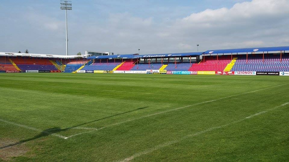 poza cu stadionul Trans-sil di Tg.Mures.